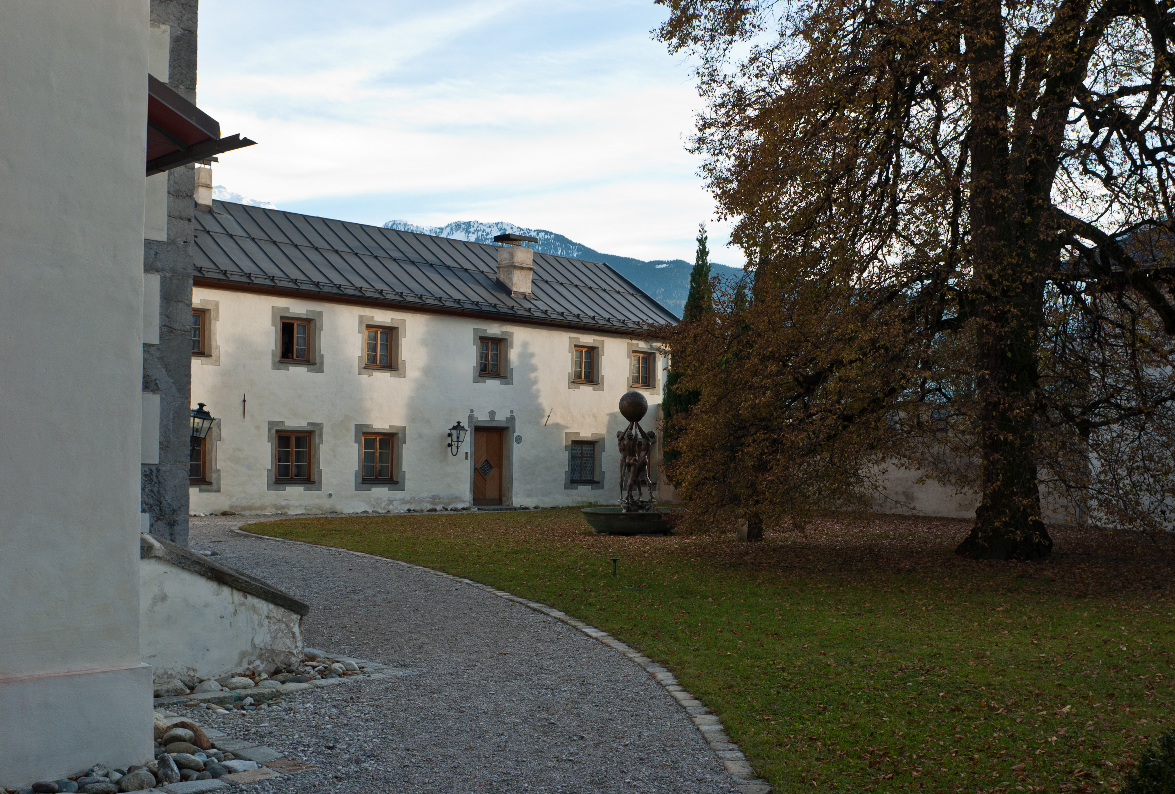 Blick von der Straße in den Hof von Schloss Sigmundslust in Vomp